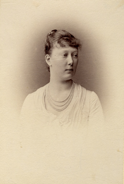 Sophie Marie Luise Amalie, Prinzessin von Baden (geb. 26.07.1865, gest. 29.11.1939) - Tochter des Prinzen Wilhelm, Gemahlin des Herzogs Friedrich von Anhalt